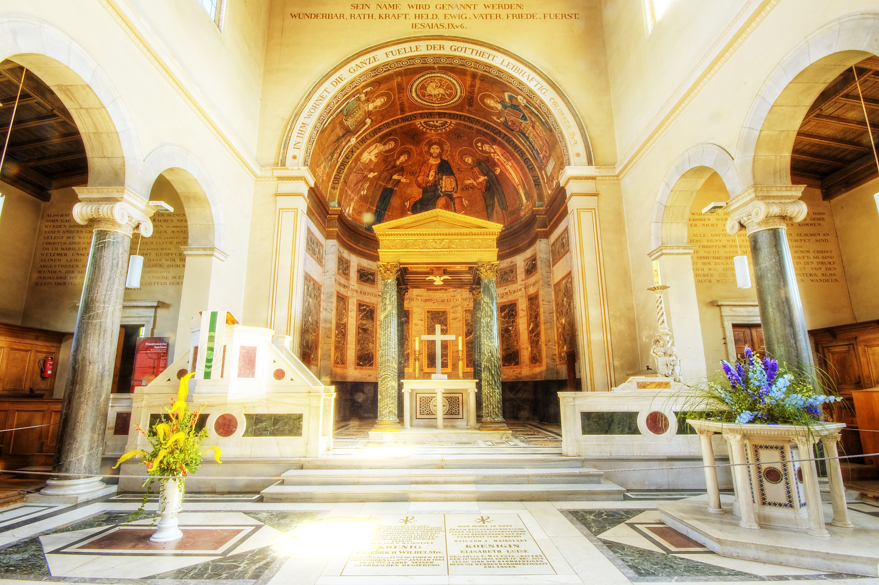 Die Friedenskirche im Schlosspark Sanssouci in Potsdam liegt im so genannten Marlygarten gleich am Grünen Gitter.